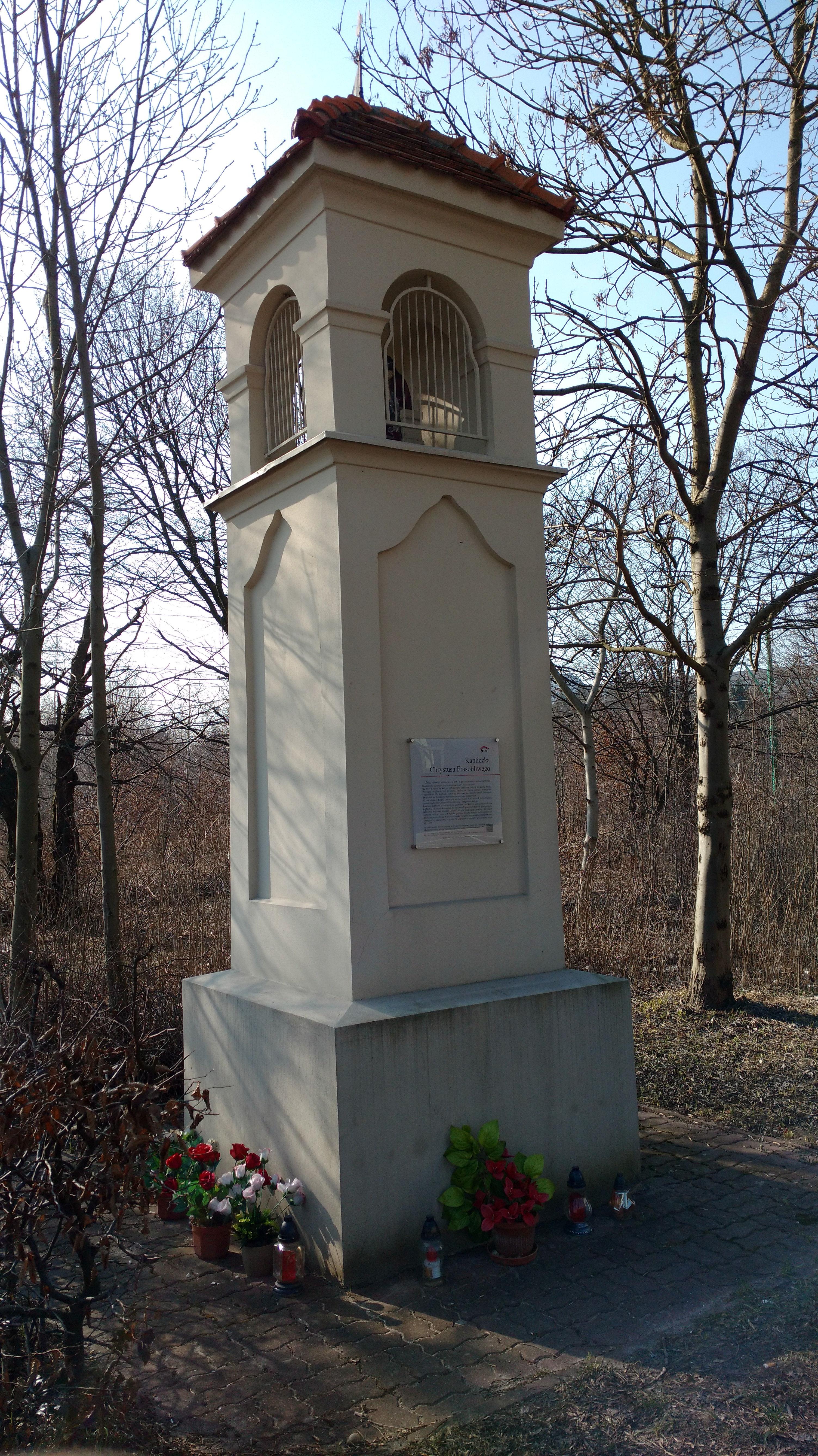 Kapliczka Chrystusa Frasobliwego na poznańskich Winiarach